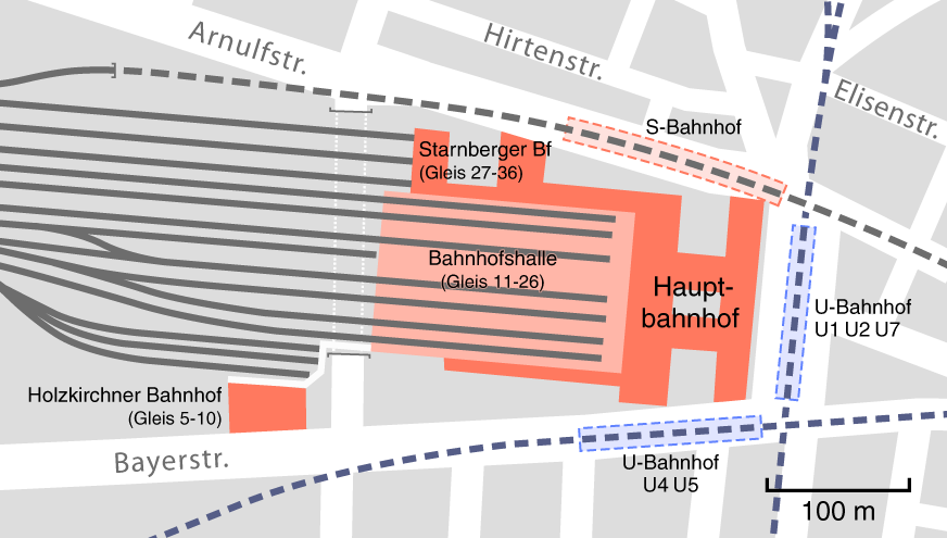 Lageplan des Münchener Hauptbahnhofes